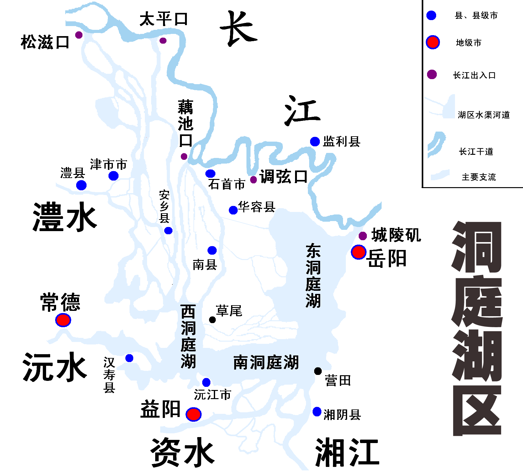 Lake Dongting；洞庭湖区